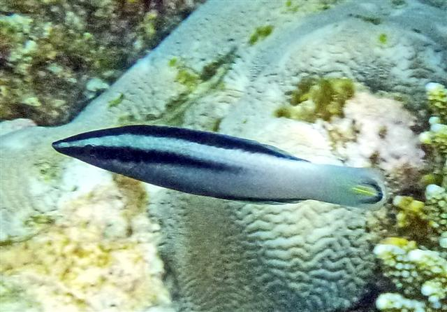 Labroides bicolor, Maldives, Mirihi, Jan. 2012